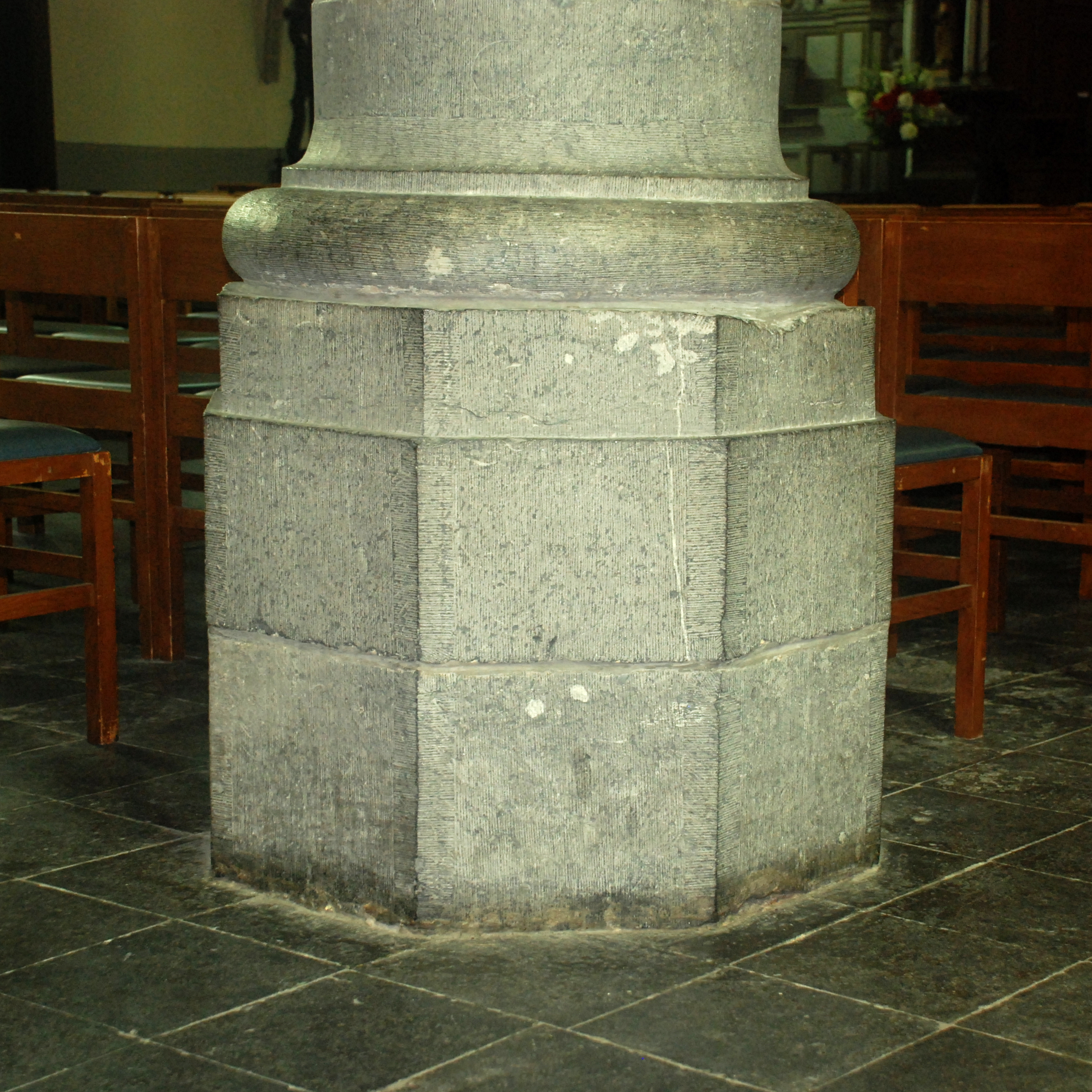 Belgique - Brabant wallon - Église de Court-Saint-Étienne